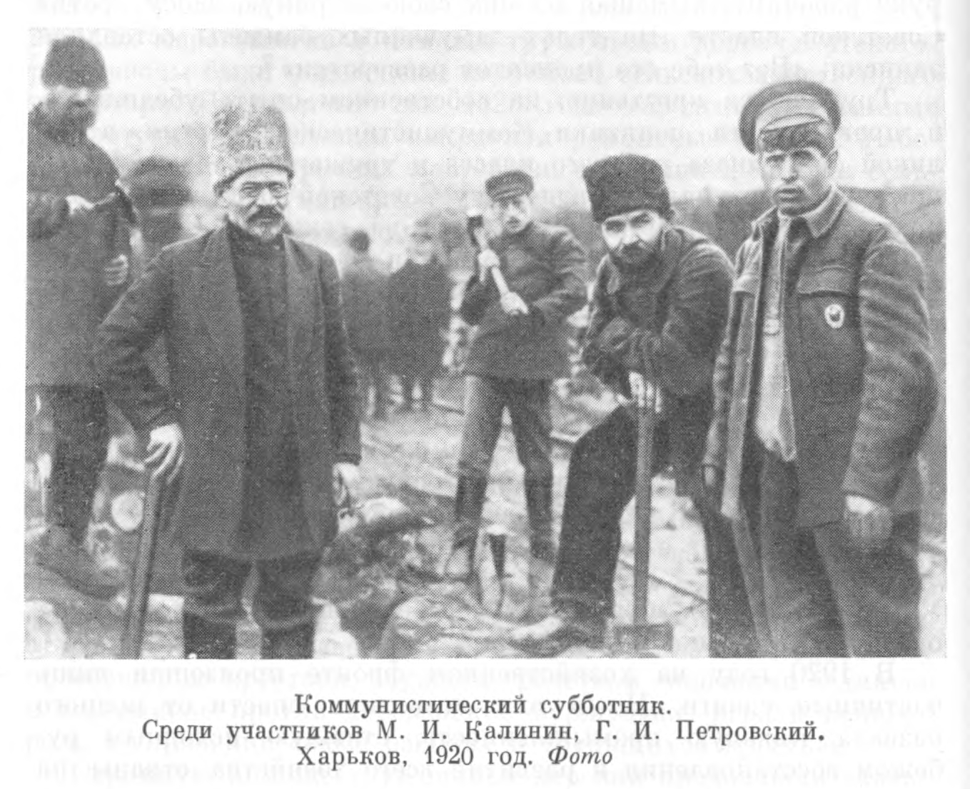 М. И. Калинин и Г. И. Петровский на Коммунистическом субботнике в Харькове